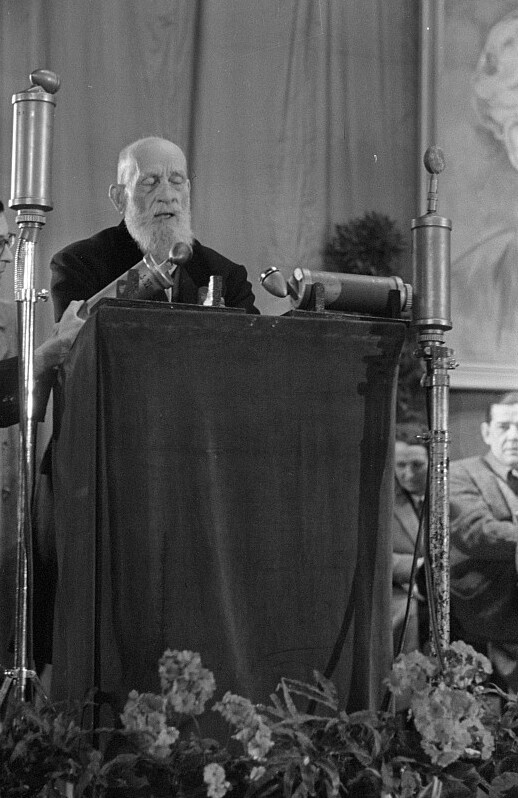 Original image description from the Deutsche Fotothek Porträt: ErnstEugen Ernst auf dem Parteitag zur Vereinigung von SPD und KPD